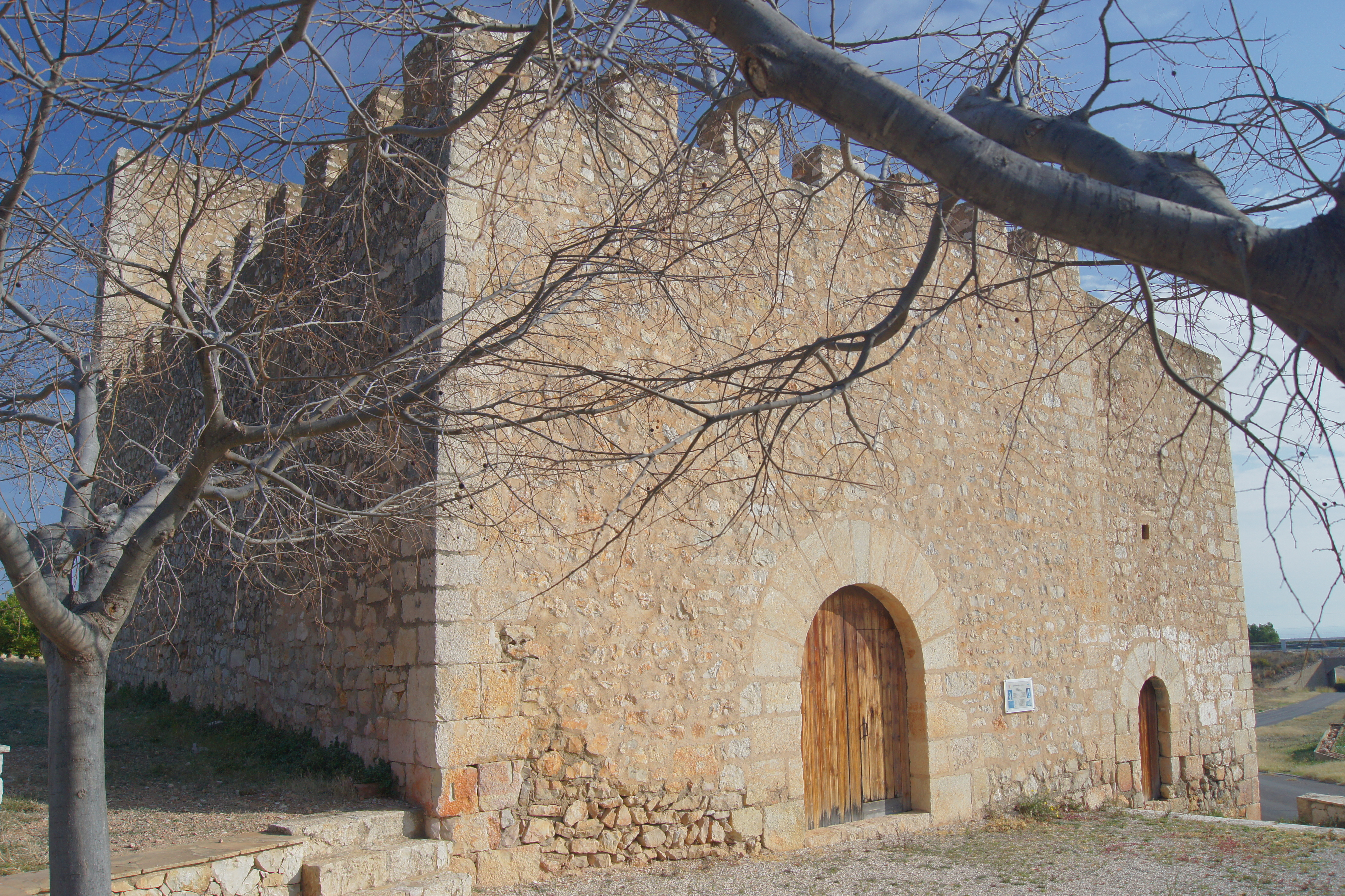 Ermita fortificada de Albalat, en el municipio de Cabanes (Castellón de la Plana, España)